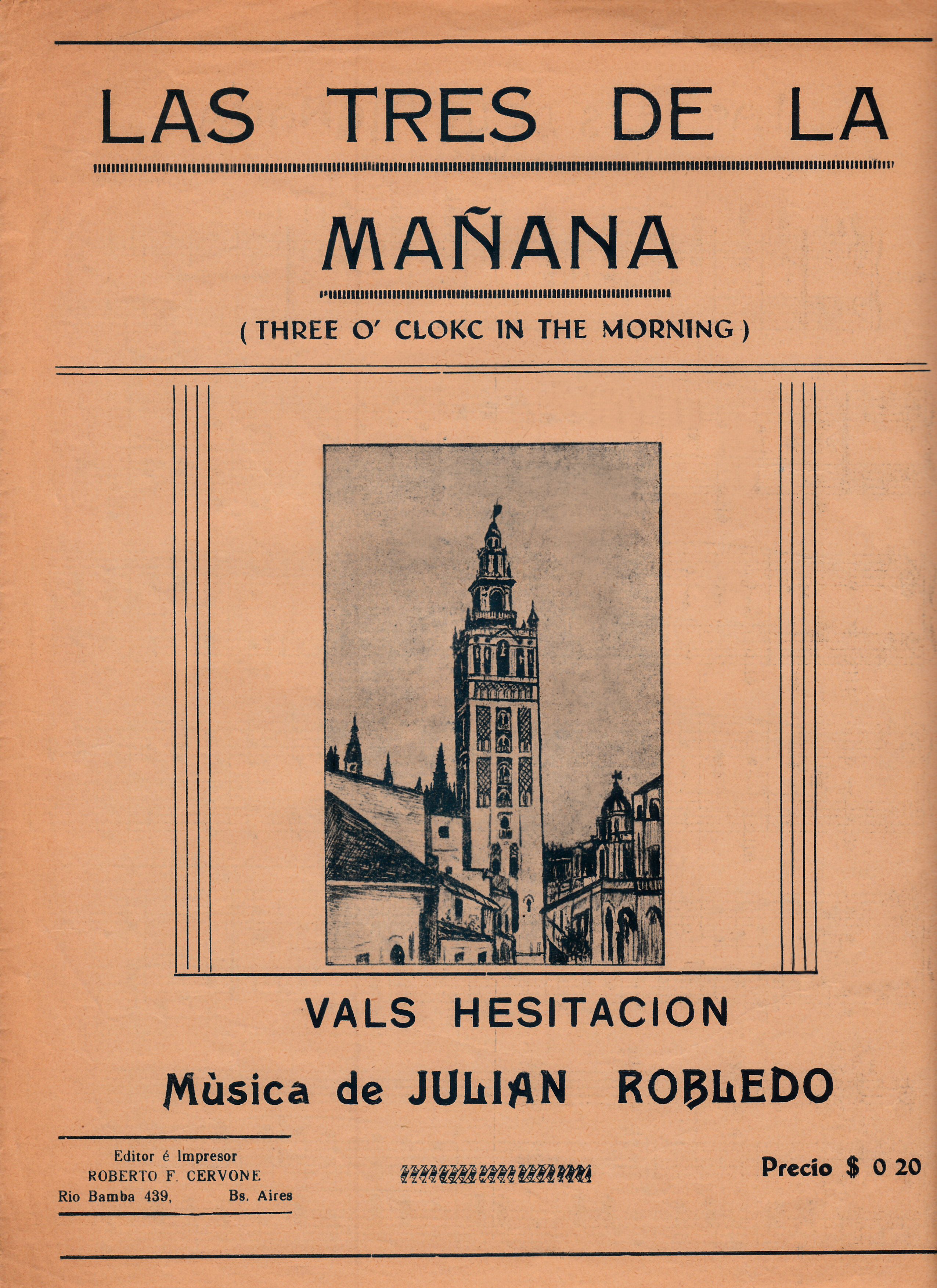 Portada de la partitura de "Las Tres de la Mañana" - Música compuesta por Julián Robledo en 1919